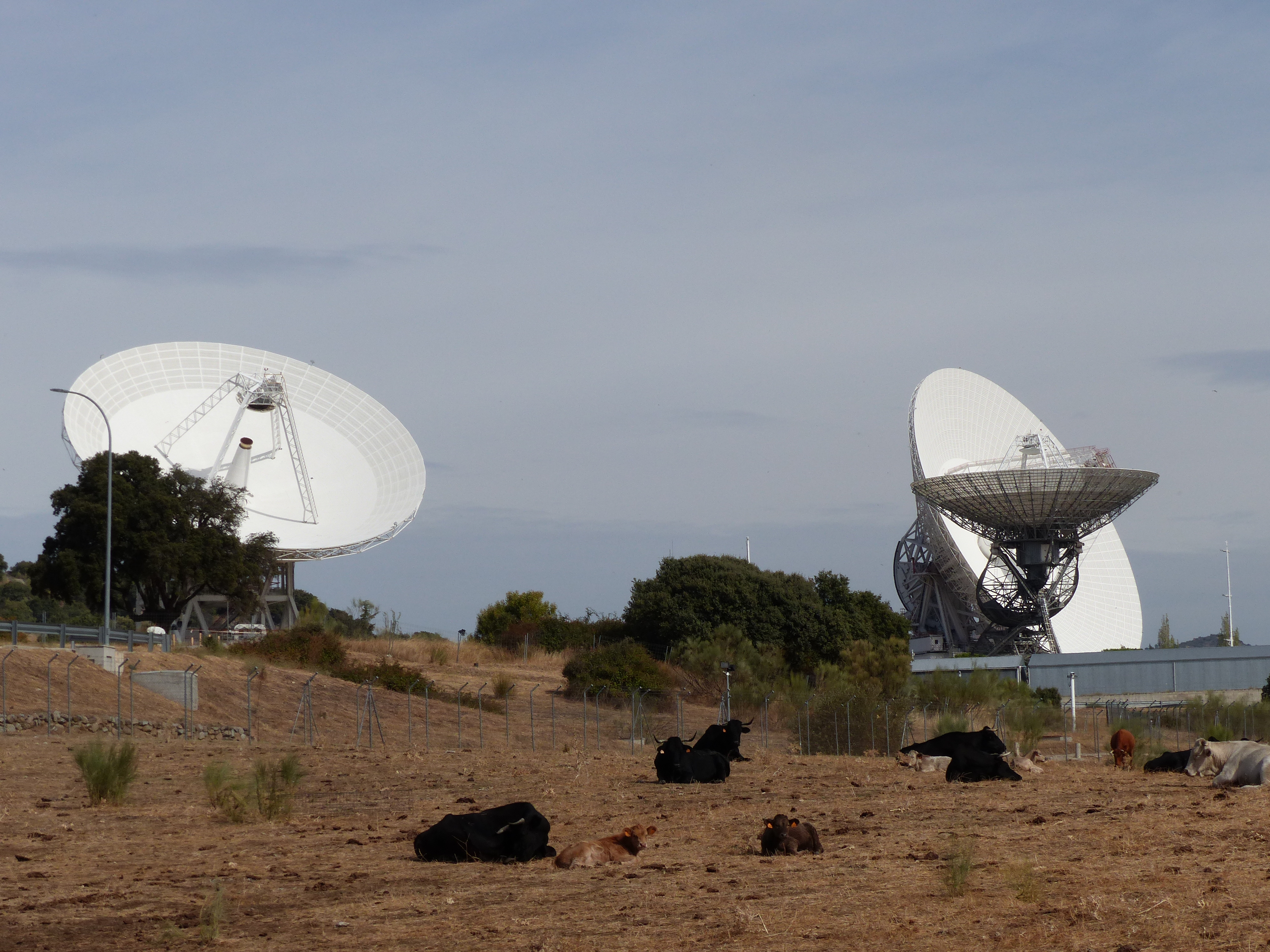 Madrid Deep Space Communications Complex